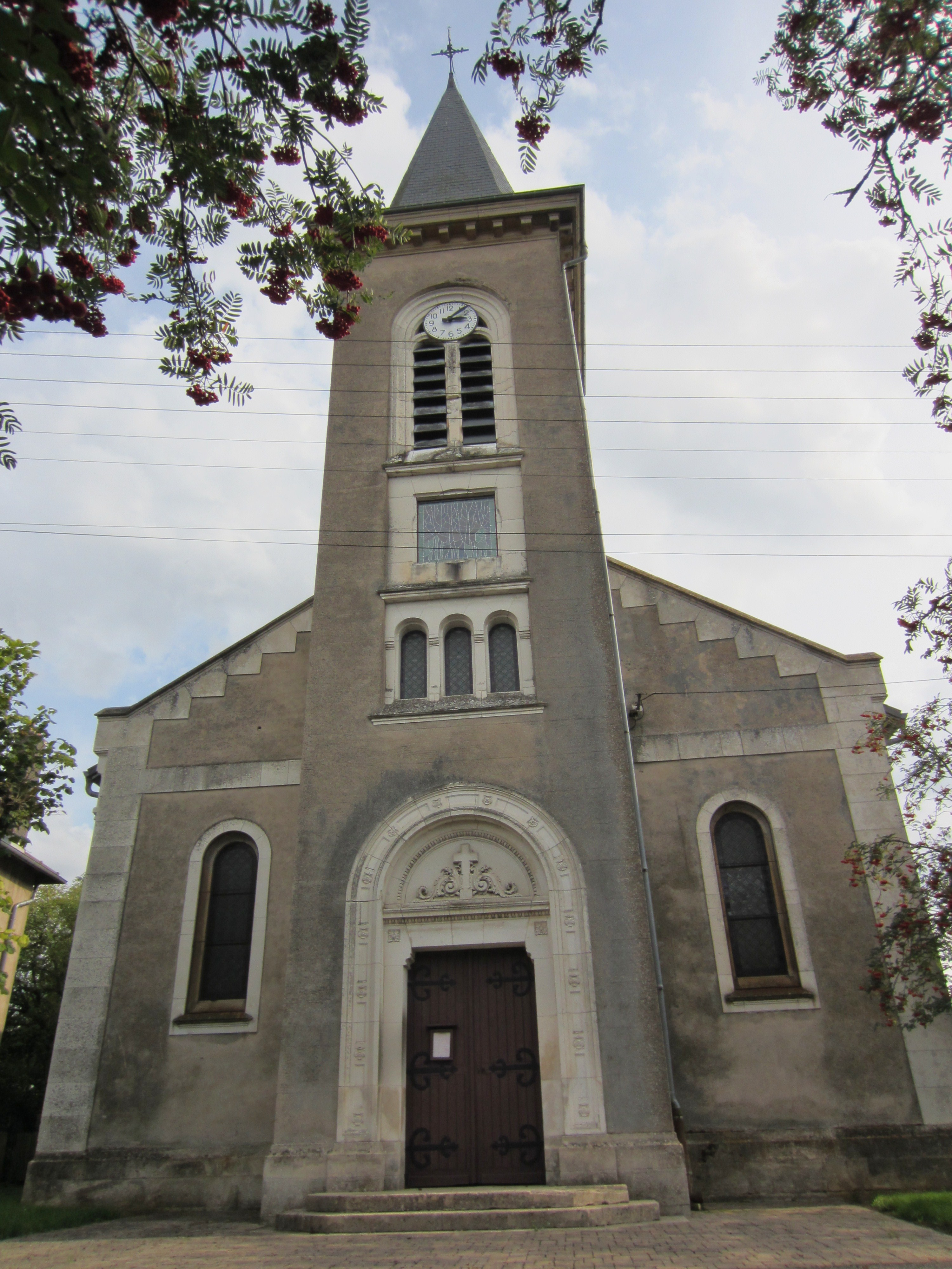 Description eglise Dampvitoux eglise Dampvitoux